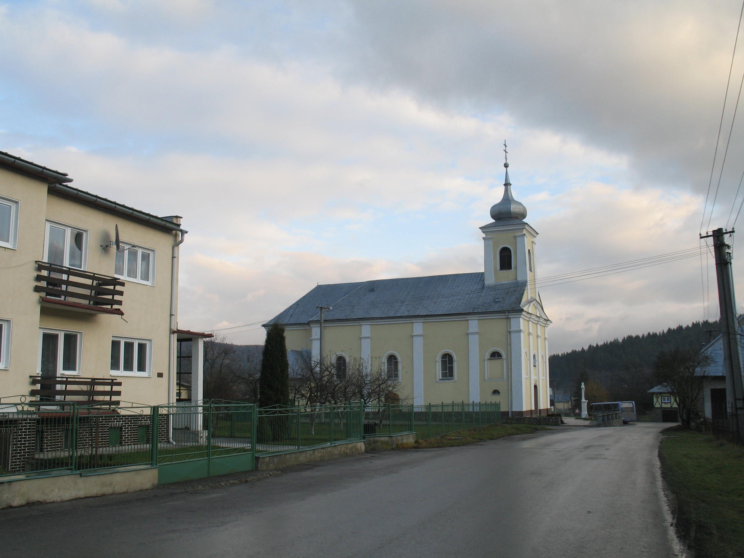 kostol v Petroviciach